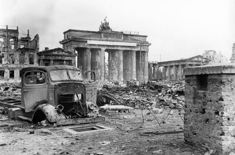 Berlin 1945 Blick über den Pariser Platz auf das Brandenburger Tor Anfang Juni 1945